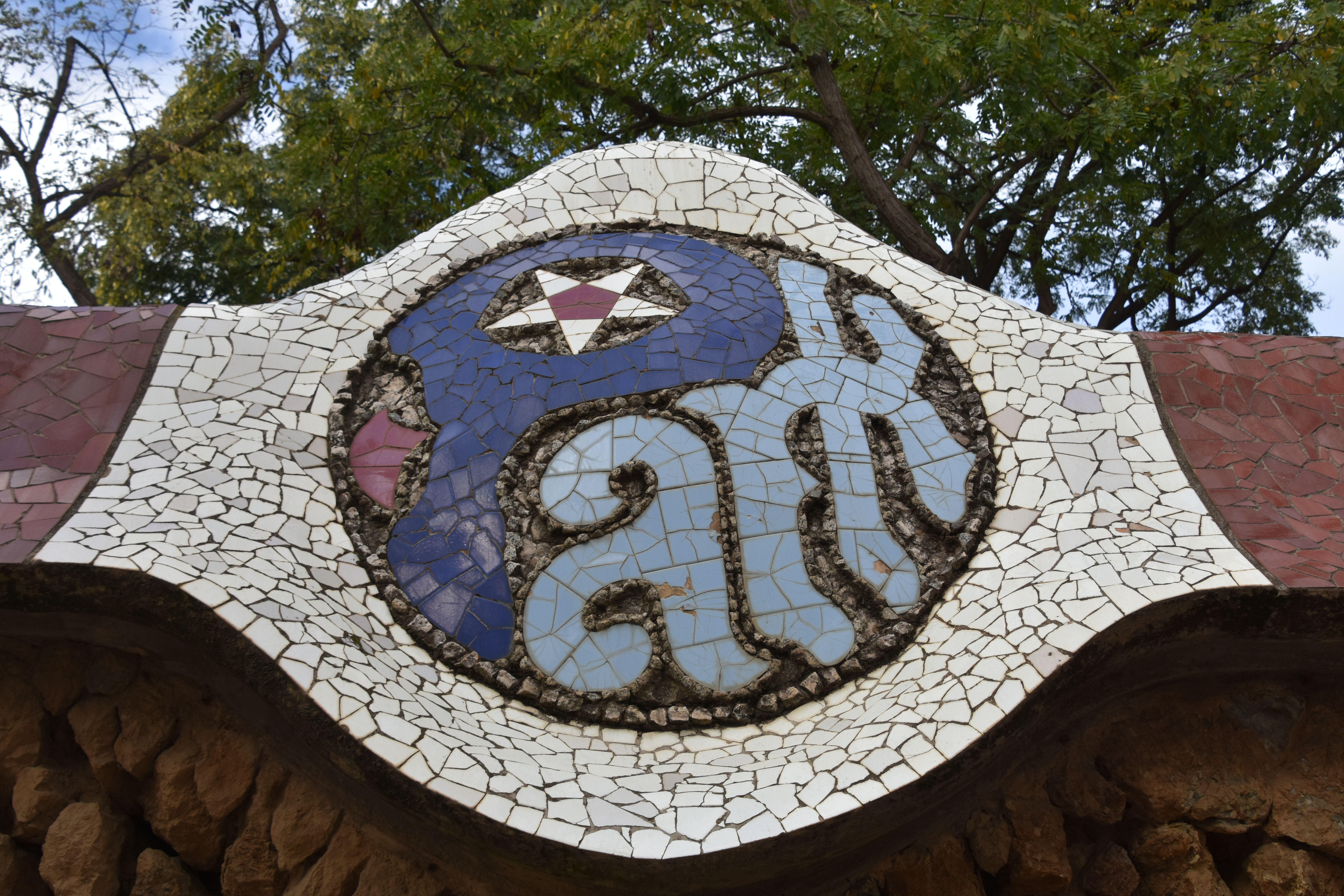 Park Guell, Gaudi, begun in 1900 (6)